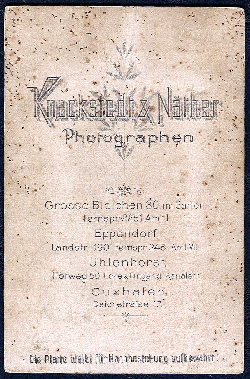 Rückseite (Revers) eines Kabinettfotos der Firma Knackstedt & Näther (KN), die sich hier eindeutig als eigene Fotografen identifizieren, hier sogar für Portrait-Fotografie. Angegebene Studios/Ateliers inHamburg: Große Bleichen 30, in Eppendorf: Landstraße 190, in Uhlenhorst: Hofweg 50, Ecke Kanalstraße. Darüber hinaus betrieb das Unternehmen eine Filiale in Cuxhafen, Deichstraße 17.